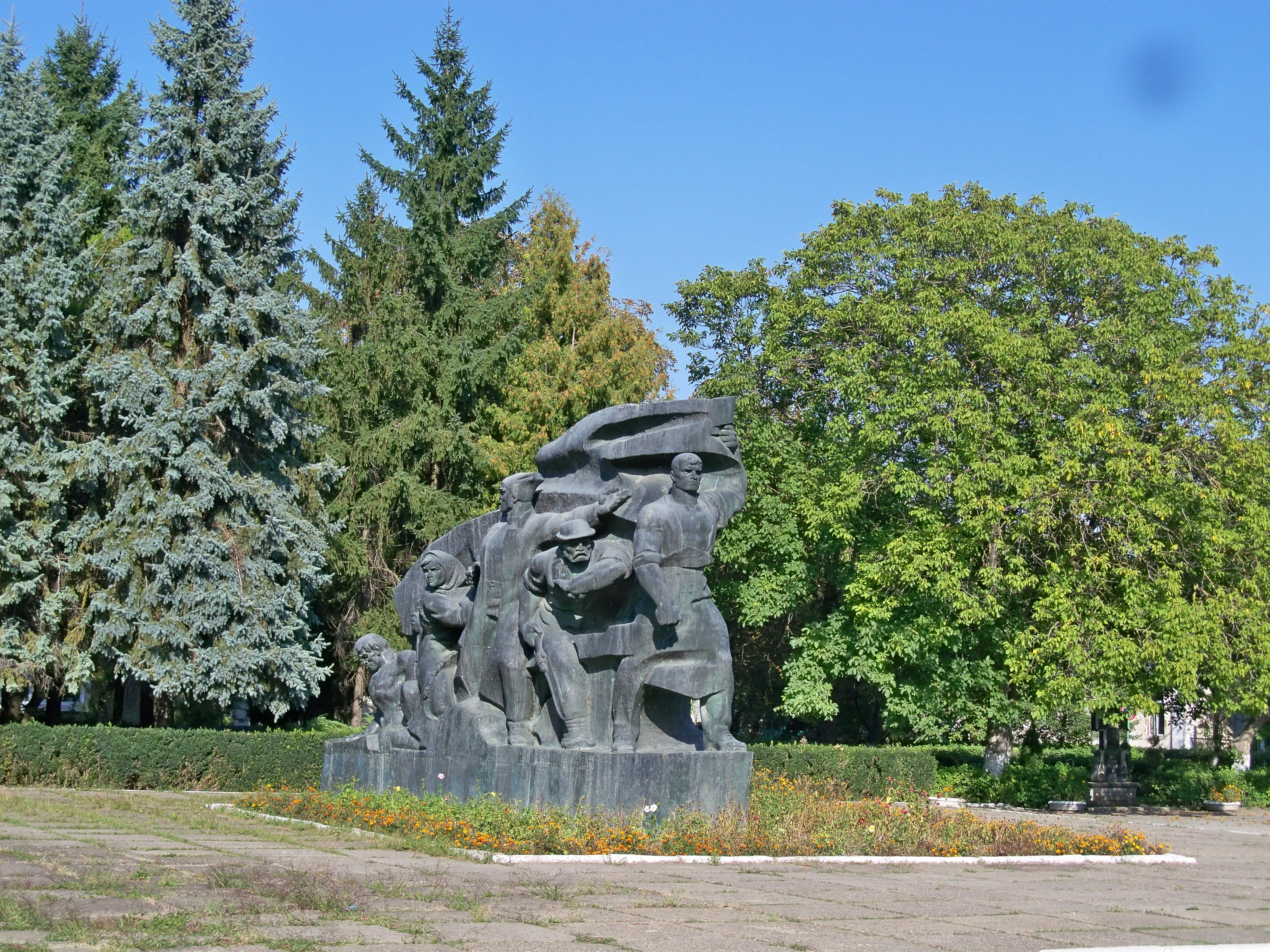 Хотинський, Хотинський район, м. Хотин